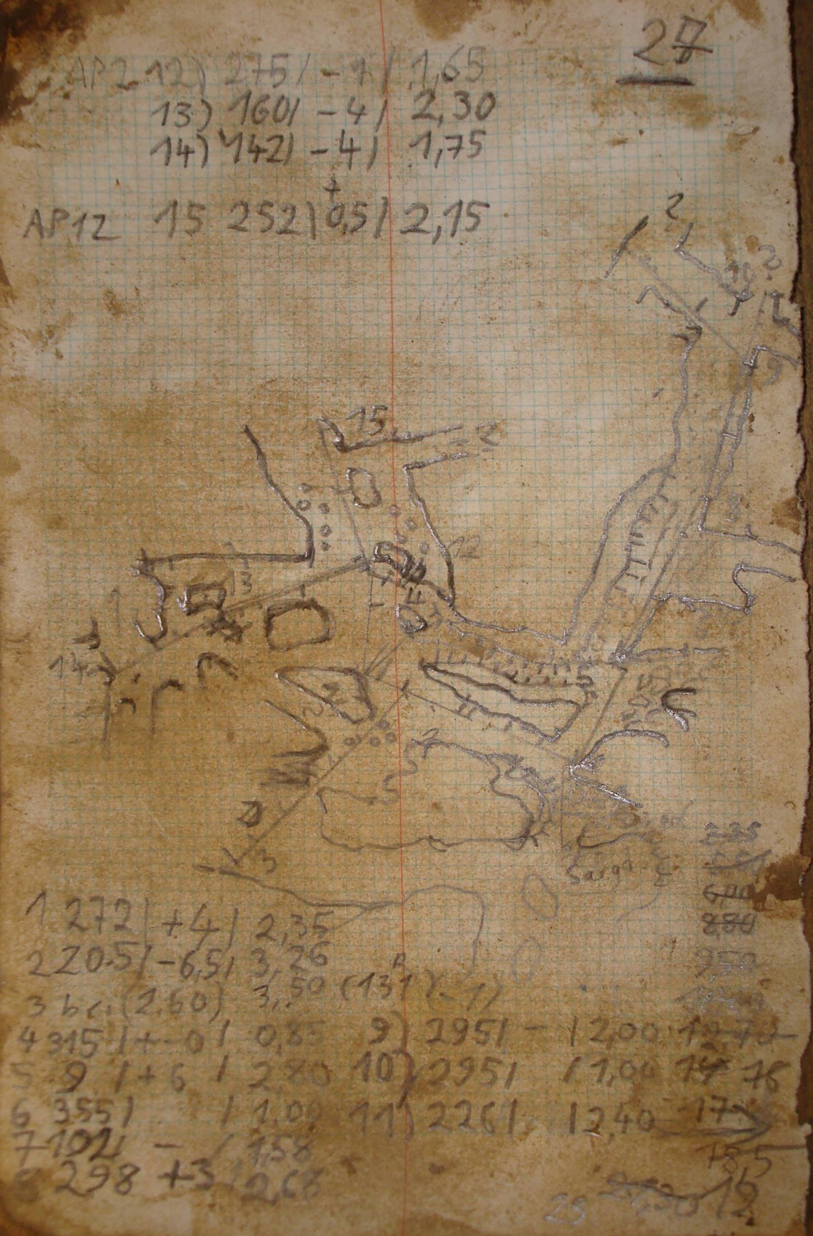 Bei einer Höhlenvermessung des Arbeitskreises Kluterthöhle entstandene Skizze aus der Ebbinghauser Höhle in Ennepetal.